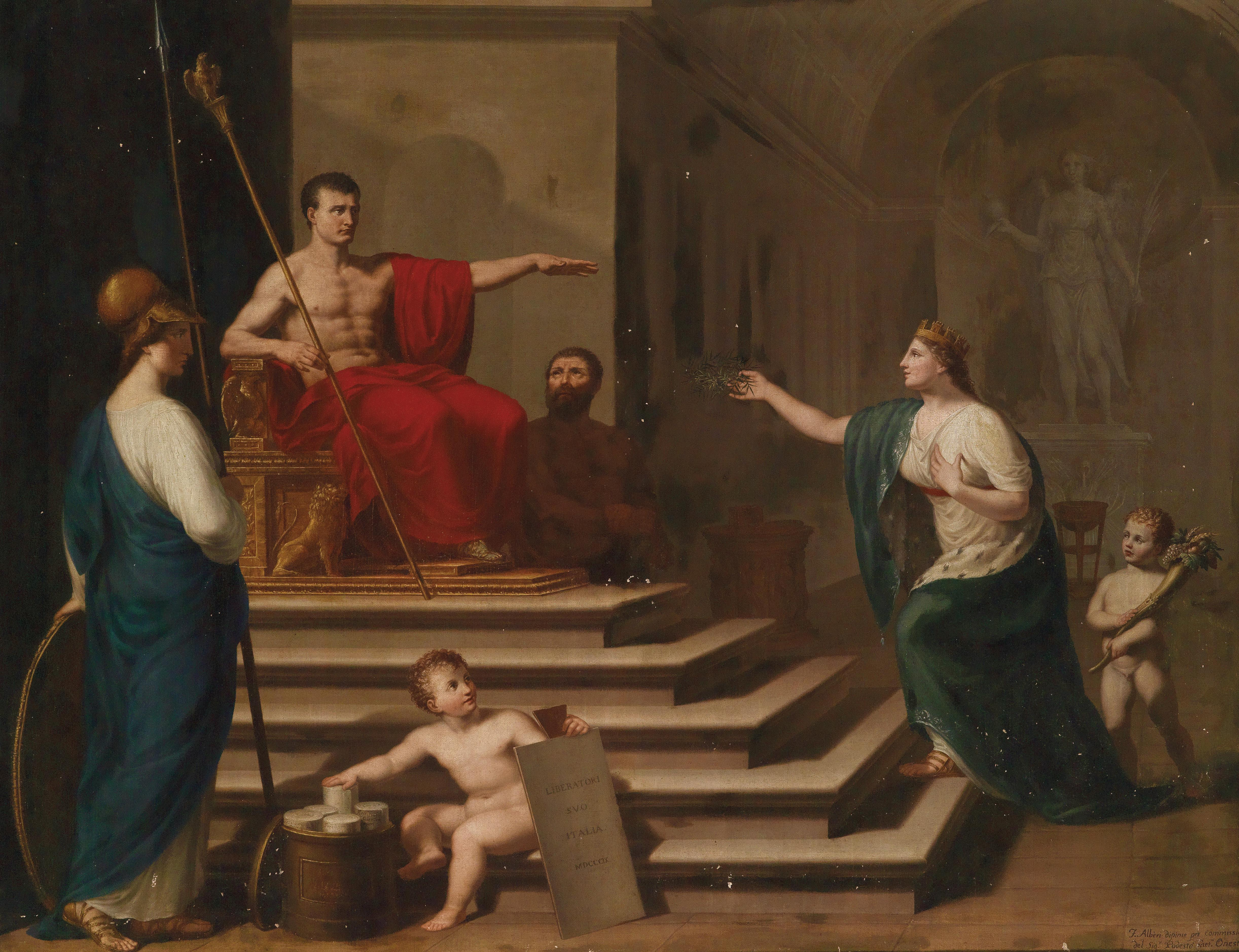 Allegorie auf Napoleon als Befreier Italiens, signiert unten rechts: F. Alberi dipinse per commissione/del Sig. Podestà Gaet. Onesti, beschriftet und datiert: Liberatori/Suo/ Italia/MDCCCIX, Öl auf Leinwand, 130 x 180 cm (geschaffen im Auftrag von Gaetano Onesti, 1748-1825, Podestà von Padua)